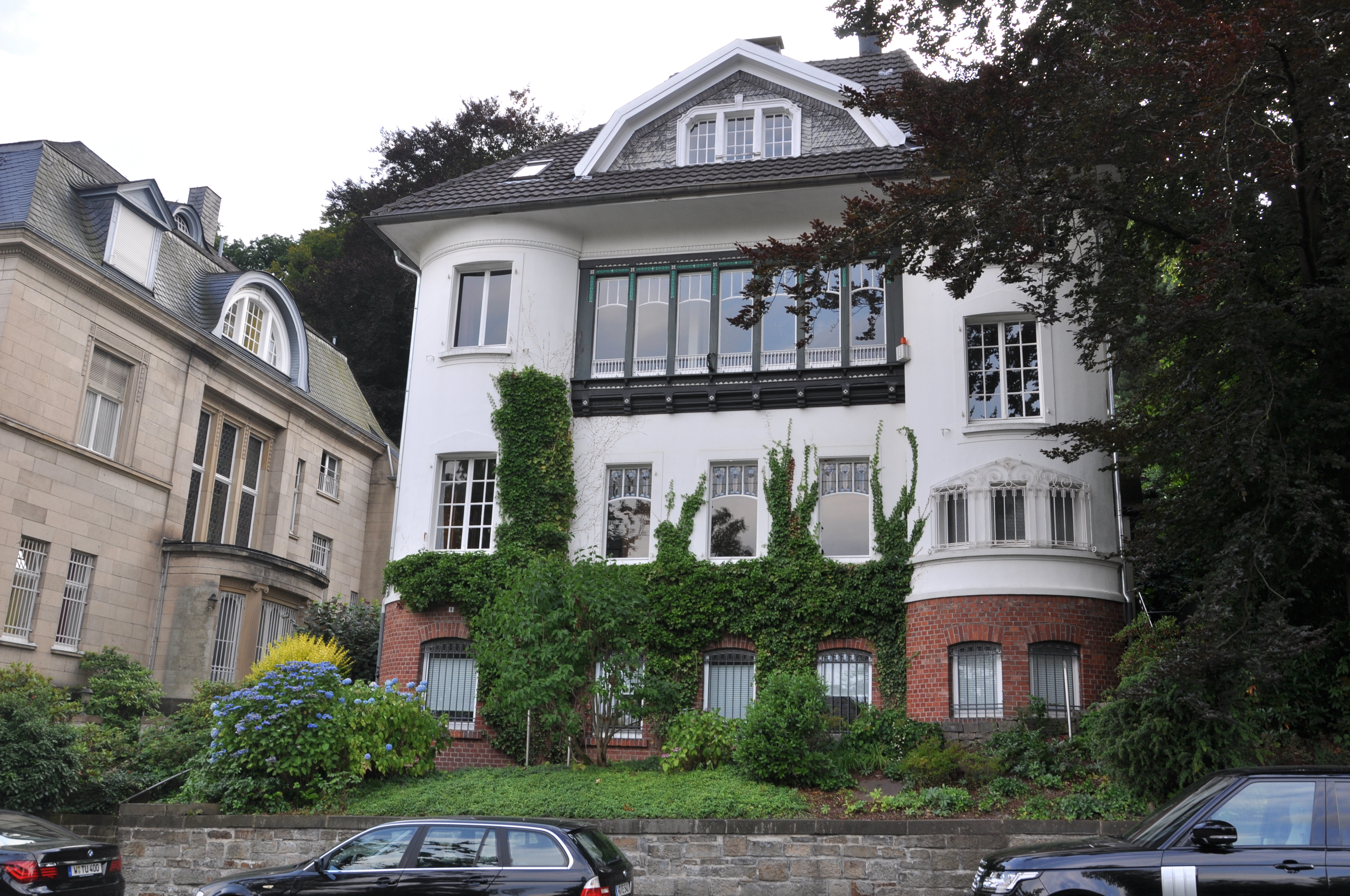 Am Buschhäuschen, Wuppertal